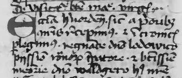 Ausschnitt aus dem Visionsbericht zur Herforder Vision aus dem Hist. Archiv der Stadt Köln (gerettet, aber noch vor Restaurierung), 10. Jh.